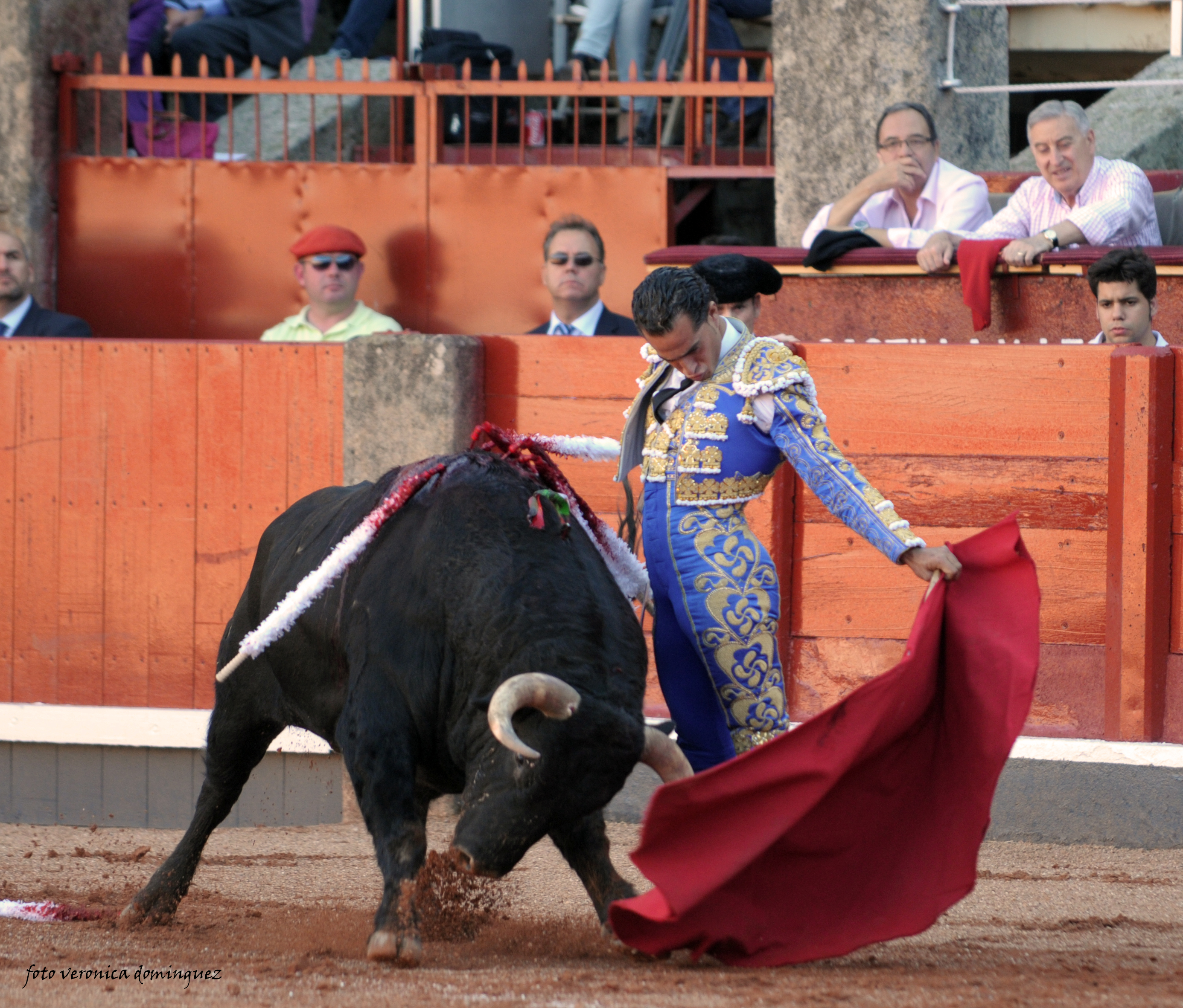 Muletazo a un toro del Pilar, durante la feria de Salamanca 2013